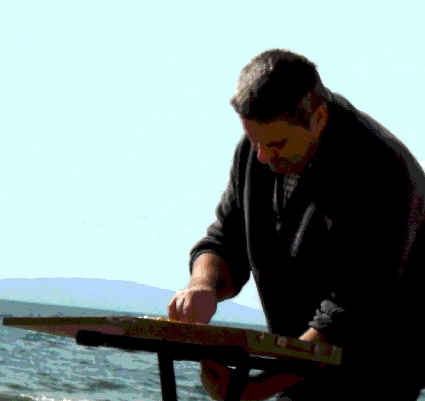 Porträt Martin Gensbaur 2011